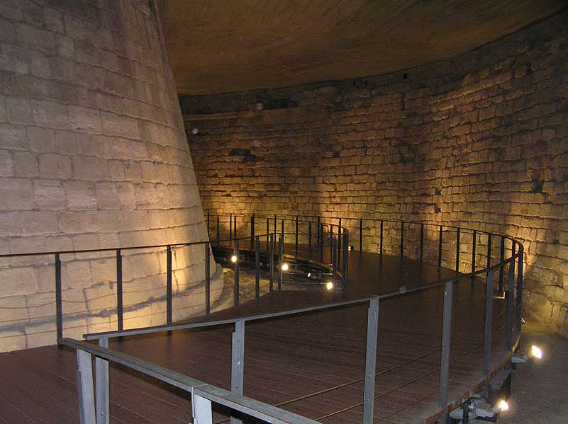 Donjon de la Forteresse du Louvre médiéval